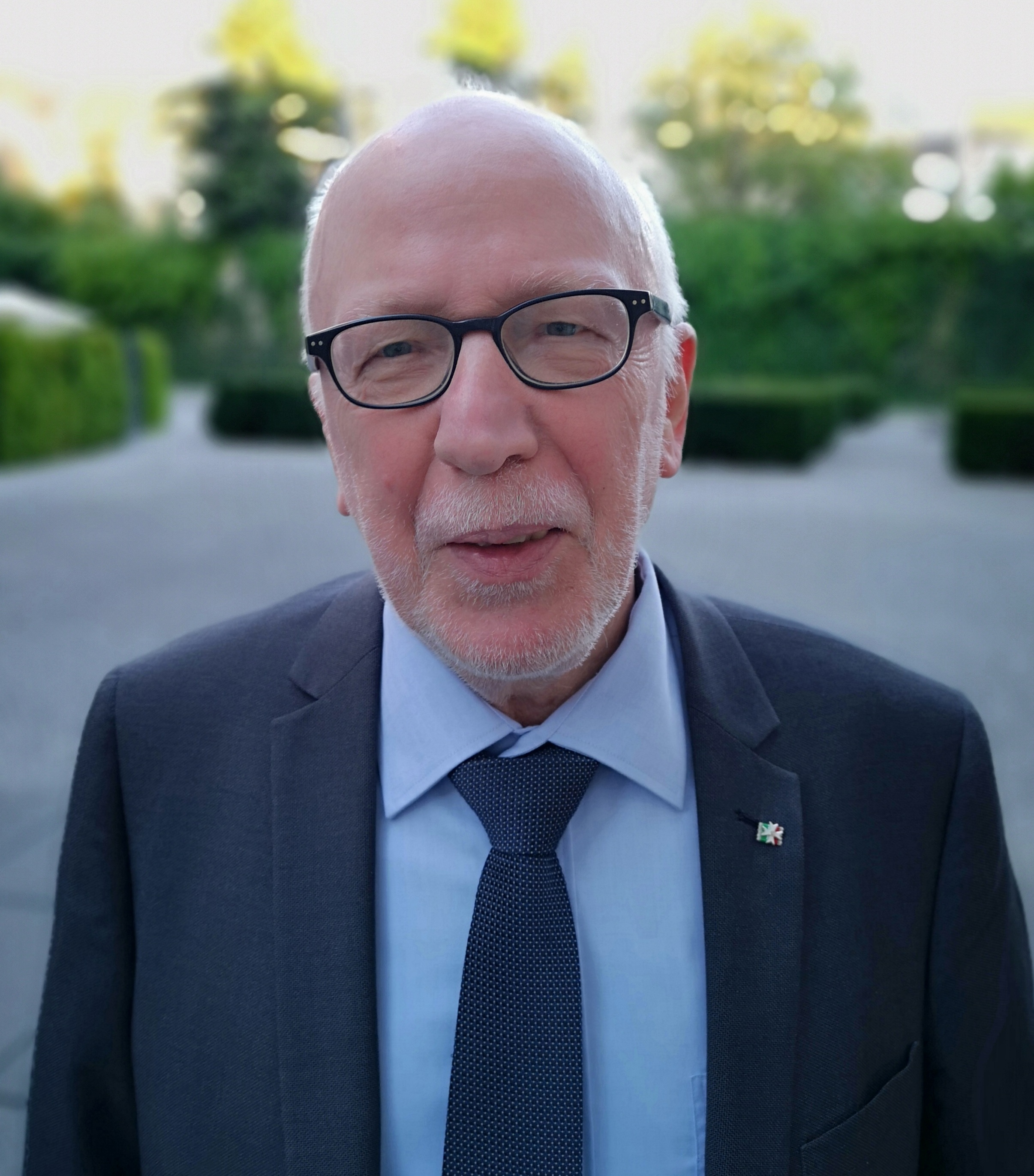 Wolfram Kuschke (2018), Verleihung des Verdienstordens des Landes Nordrhein-Westfalen 2018